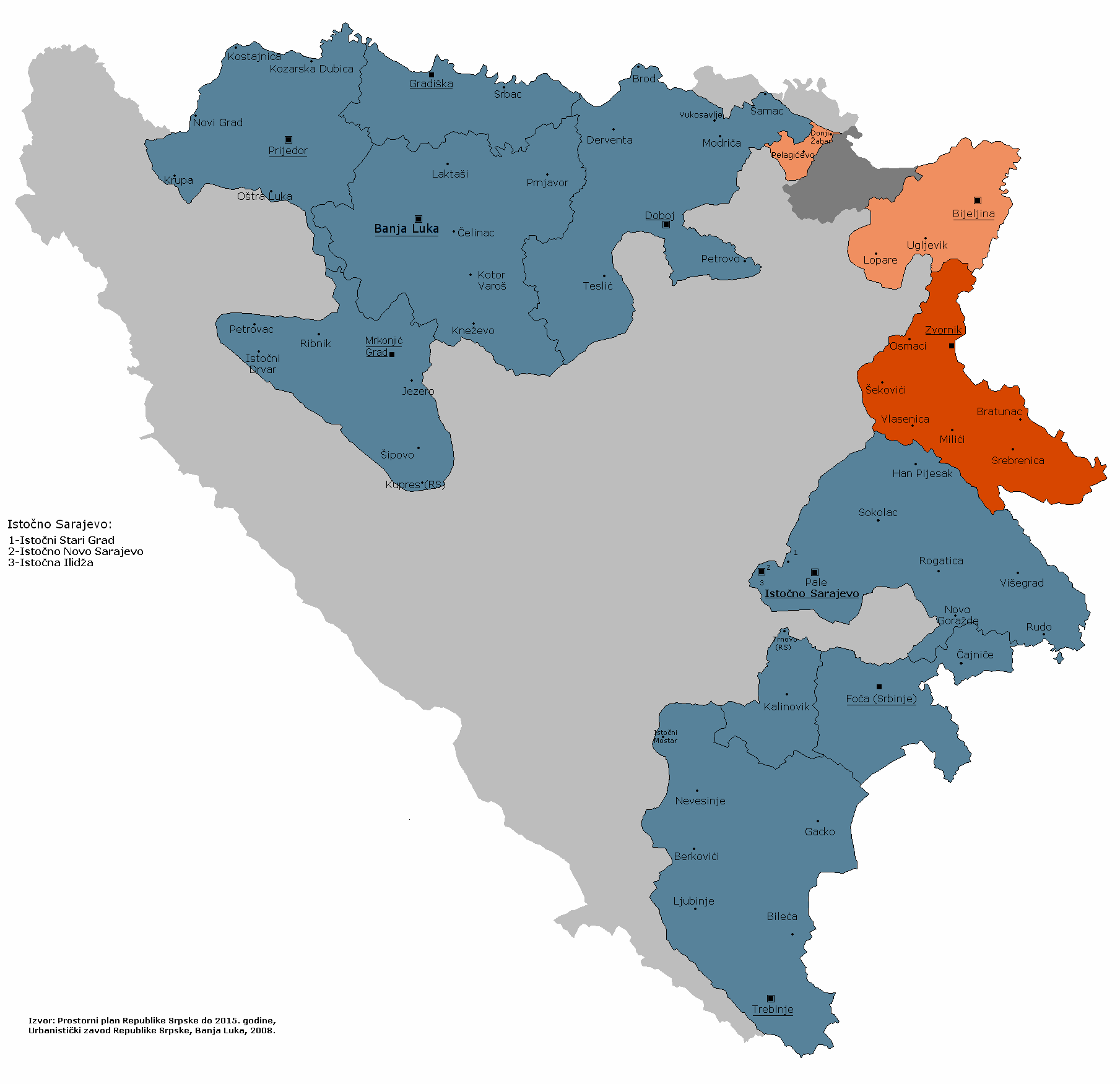 Субрегија Зворник према Просторном плану Републике Српске